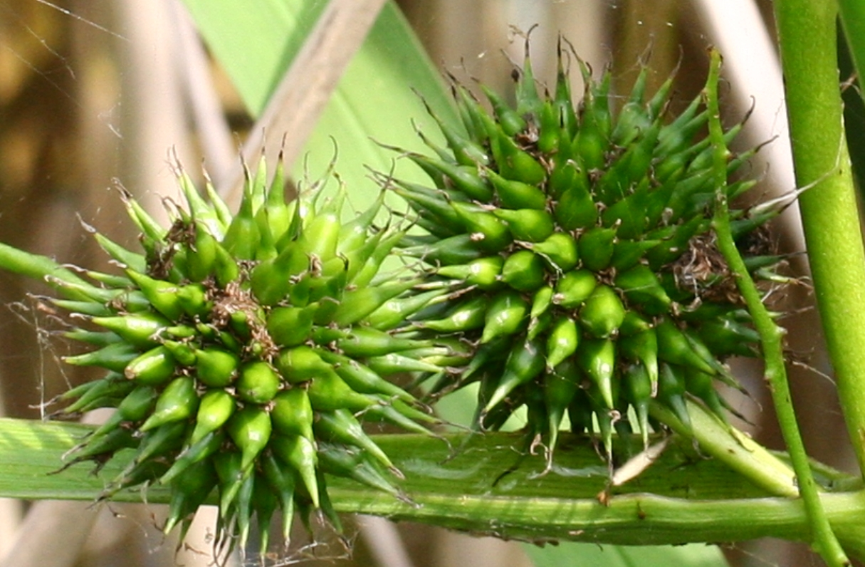 Sparganium_erectum (Coltellaccio maggiore) Località : Orto Botanico Conservativo “Carlo Spegazzini” (TV)